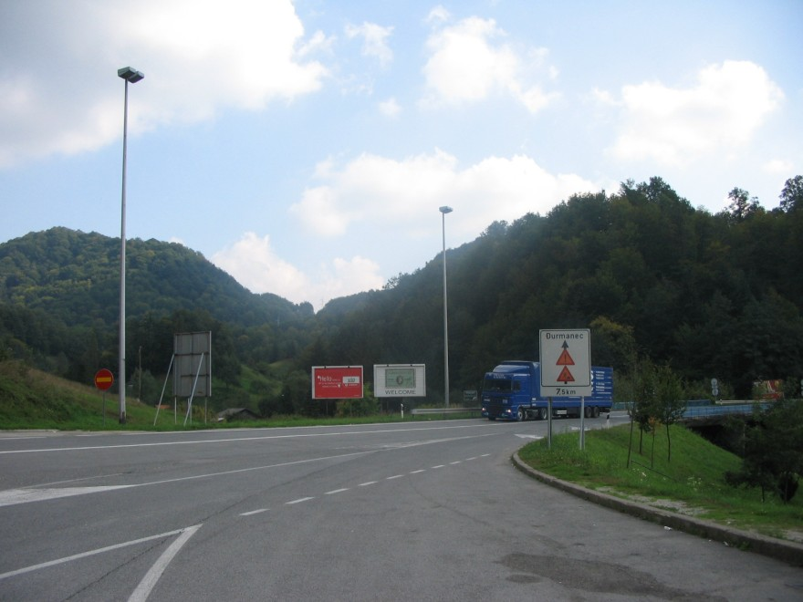 Slovēnijas - Horvātijas robeža, Macelj